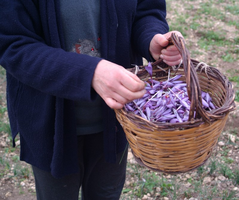 Raccolta dello zafferano a Navelli – Italia.